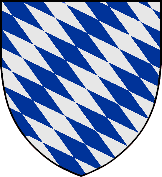 Vapensköld för tyska adelsätten Wittelsbach